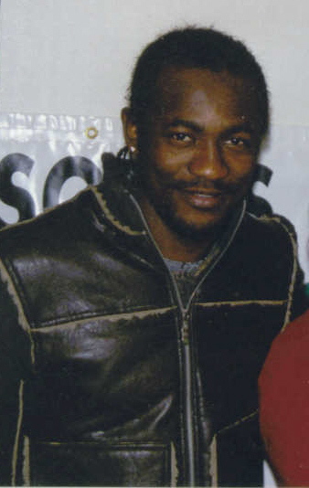 Photo du joueur de football Didier Zokora lors de la saison 2005-2006. Cette photo à été prise par Mickaël Roure alias Altrensa pour Wikipédia. Elle ne saurait être utilisée sans la mention de son auteur. D'avance merci.